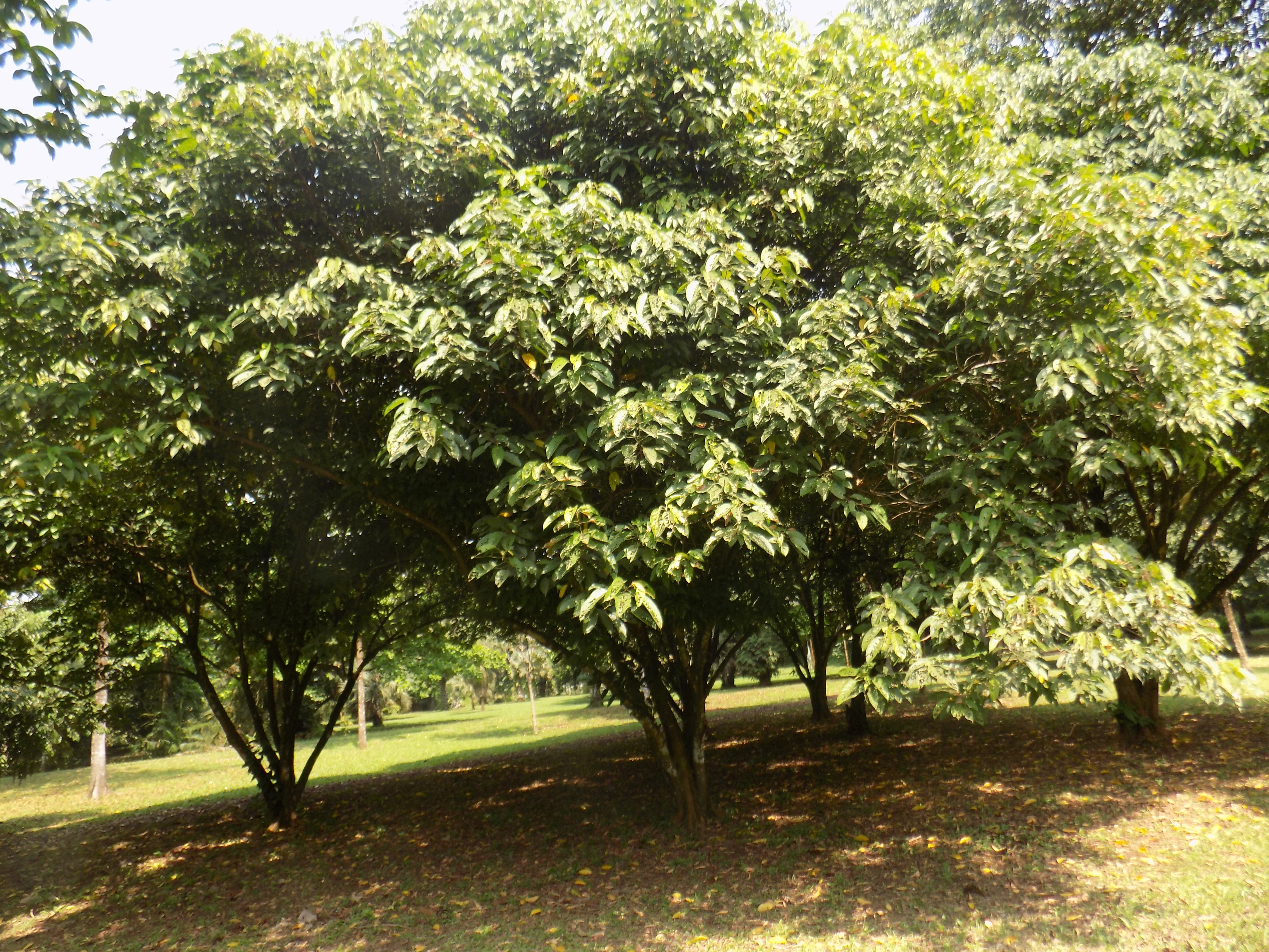 Caloncoba glauca est une plante à deux coeurs, décrite pour la première fois par Ambroise Marie François Joseph Palisot de Beauvois, et maintenant connue sous le nom d'Ernest Friedrich Gilg. Jardin botanique de Limbé, Région du Sud-Ouest, Cameroun